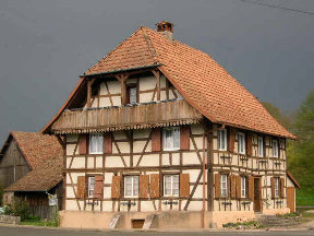 maison à colombages à Boron (Territoire de Belfort) Photo prise un jour d'orage de début mai 2004 par LP90. Licence GFDL LP90 mai 2004